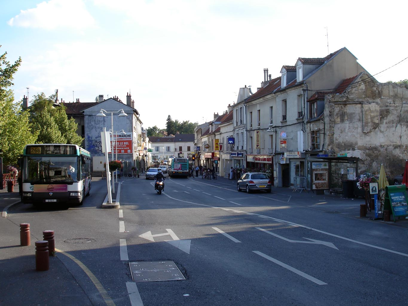 La rue Pierre-Brossolette à Sarcelles (Val-d'Oise), France Vue en direction du sud. Août 2007 Photo personnelle (own work) de Clicsouris